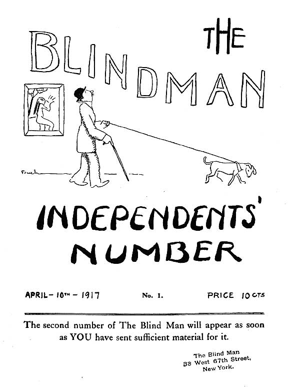 The Blind Man, issue 1, 1917.